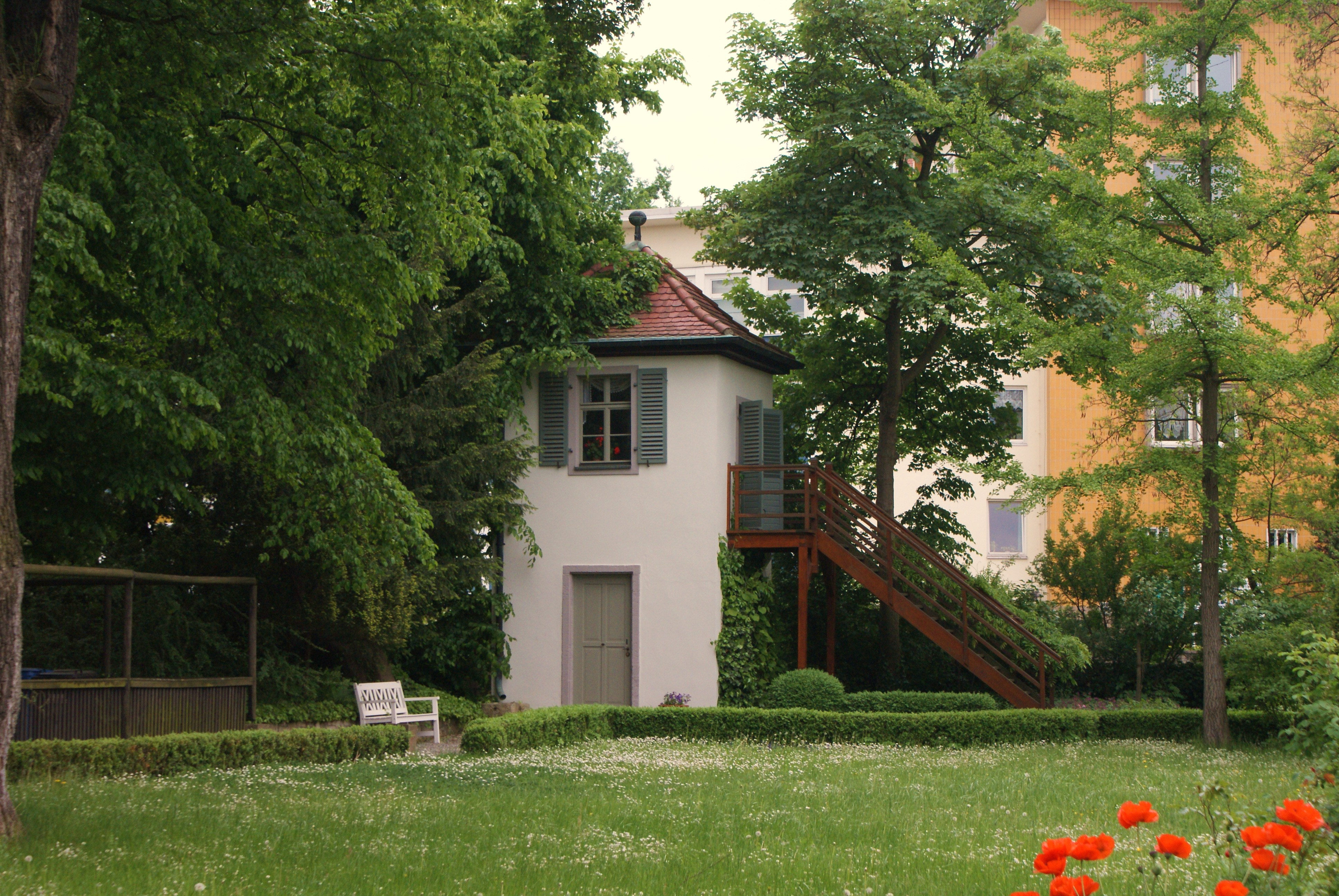 Die "Gartenzinne" im Garten von Schillers Gartenhaus